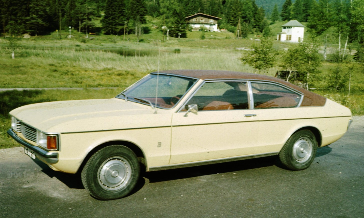 Ford Granada in Alpine setting